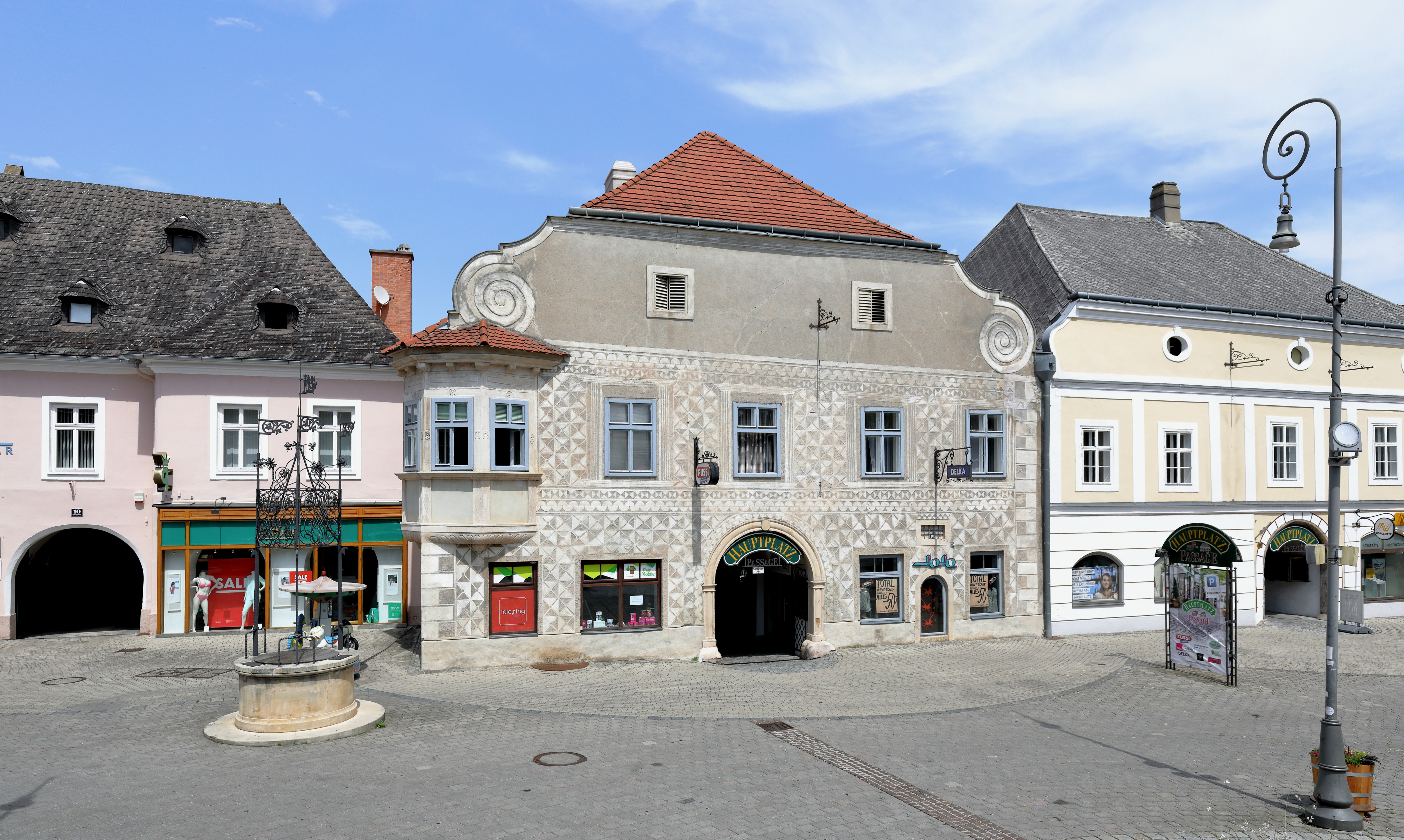 Das sogenannte „Sgraffitohaus“ an der Adresse Hauptplatz 11 in der niederösterreichischen Stadtgemeinde Neunkirchen. Ein Renaissancehaus mit reicher Sgraffitodekoration aus der 2. Hälfte des 16. Jahrhunderts an der Hauptfassade, Runderker und rundbogigem Portal mit der Jahreszahl 1591.